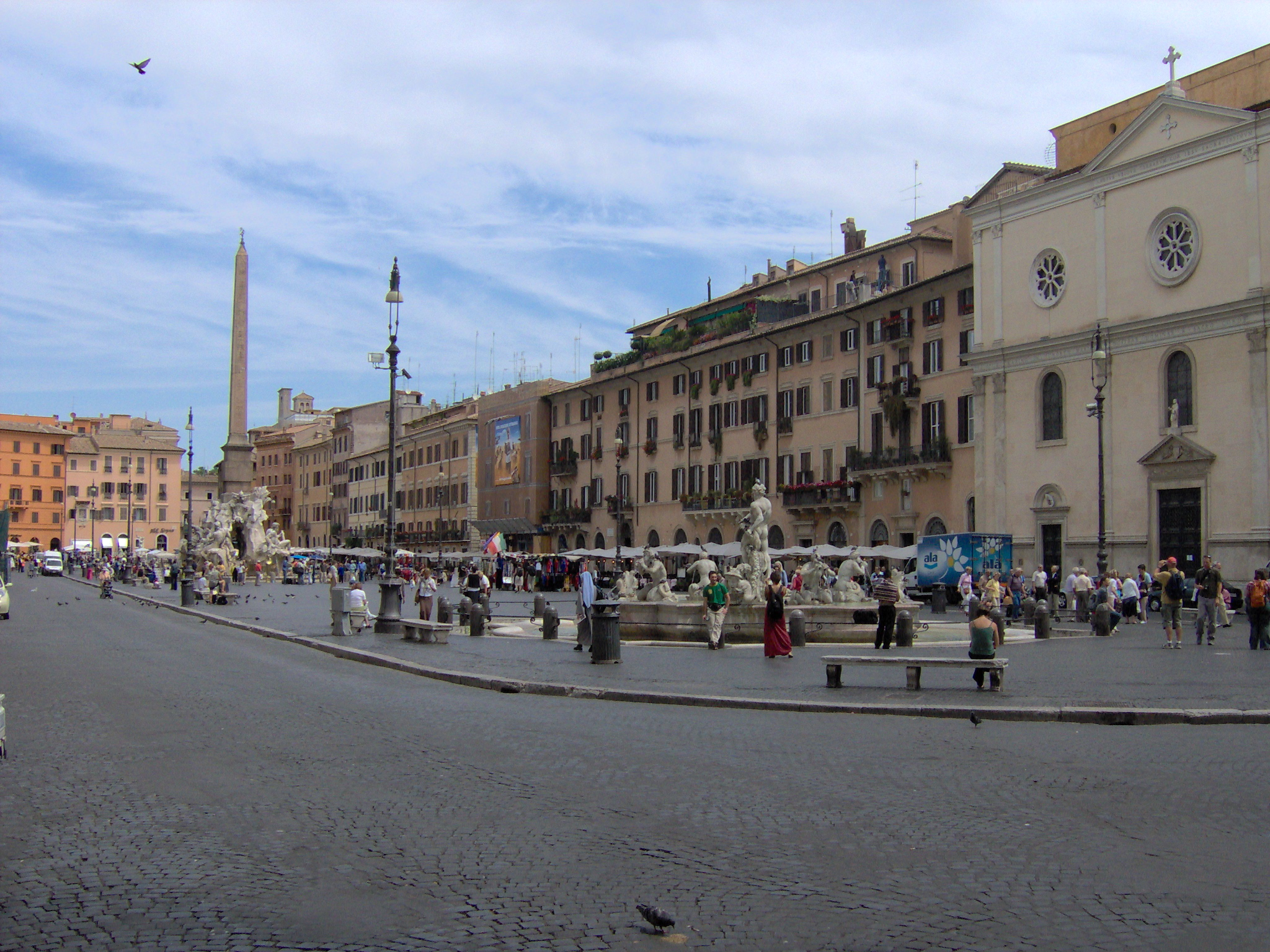 Piazza Navona - Roma